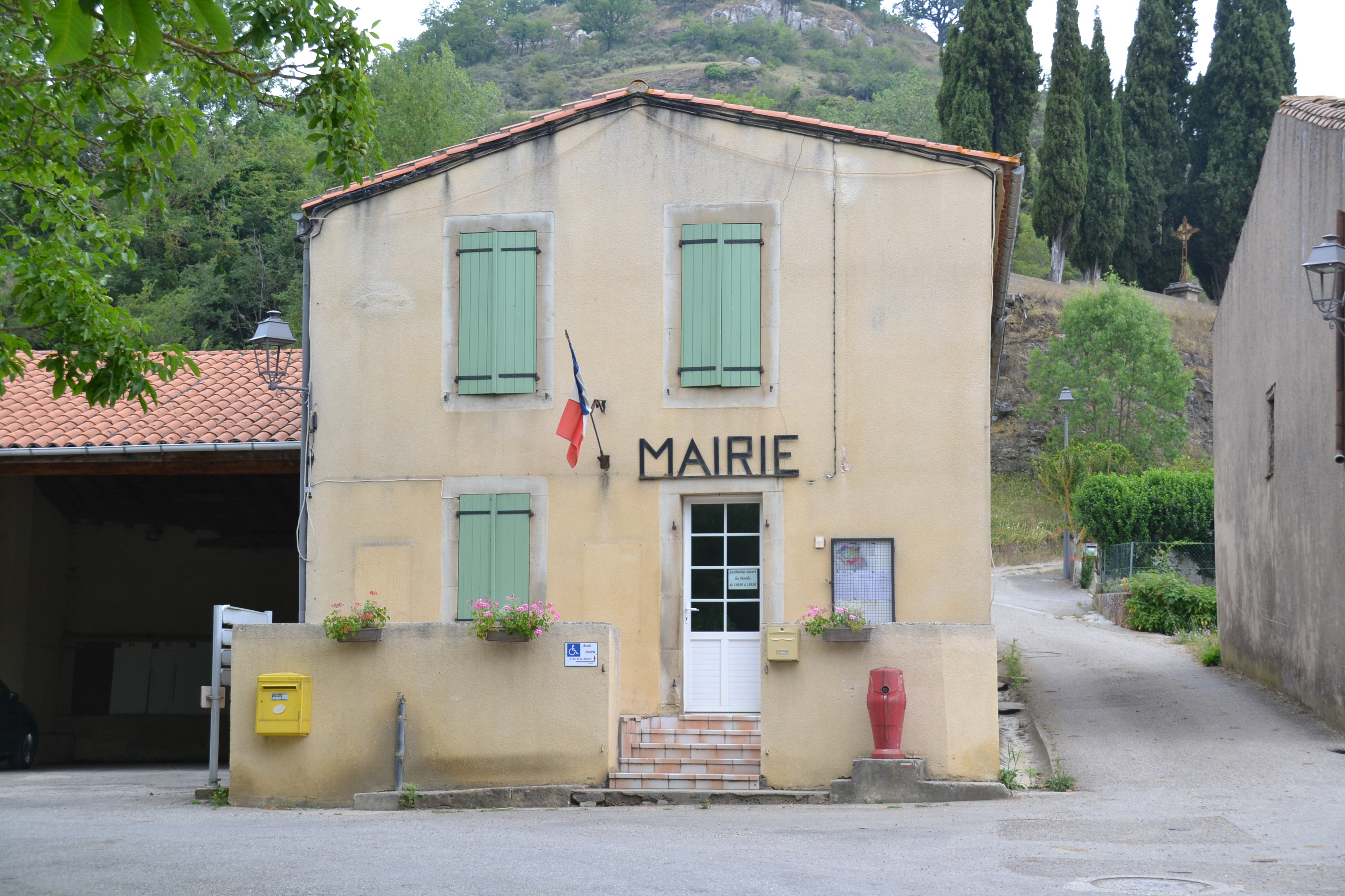 La mairie de Montjardin (Aude, France).